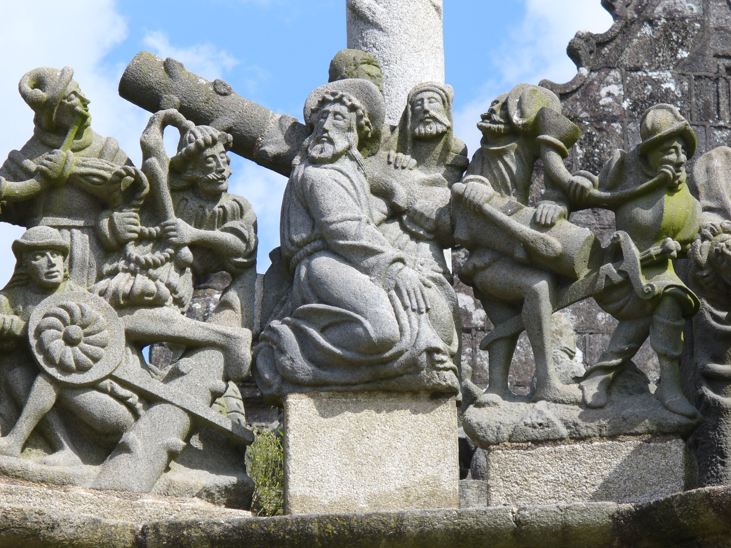 Jesus umringt von den Söldnern Pilatus ,das Kreuz zu seiner Hinrichtung auf seinen Schultern tragend-Calvaire-Kalvarienberg von Saint Miliau in Guimiliau (1581-1588)-Enclos Paroissal-Umfriedeter Pfarrbezirk